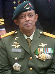 Djoko Santoso, mantan Panglima TNI.